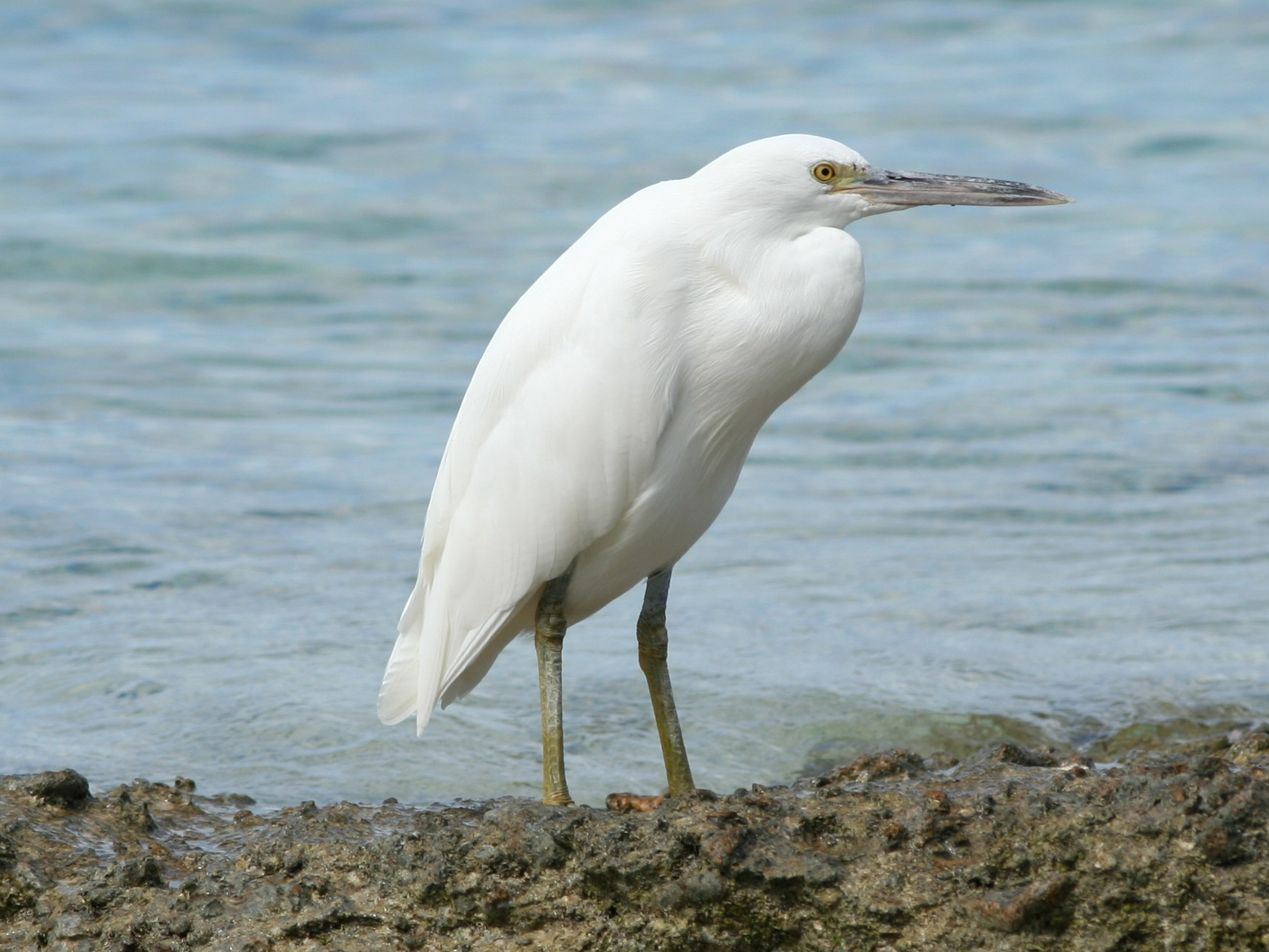 Eastern Reef Egret, Egretta sacra